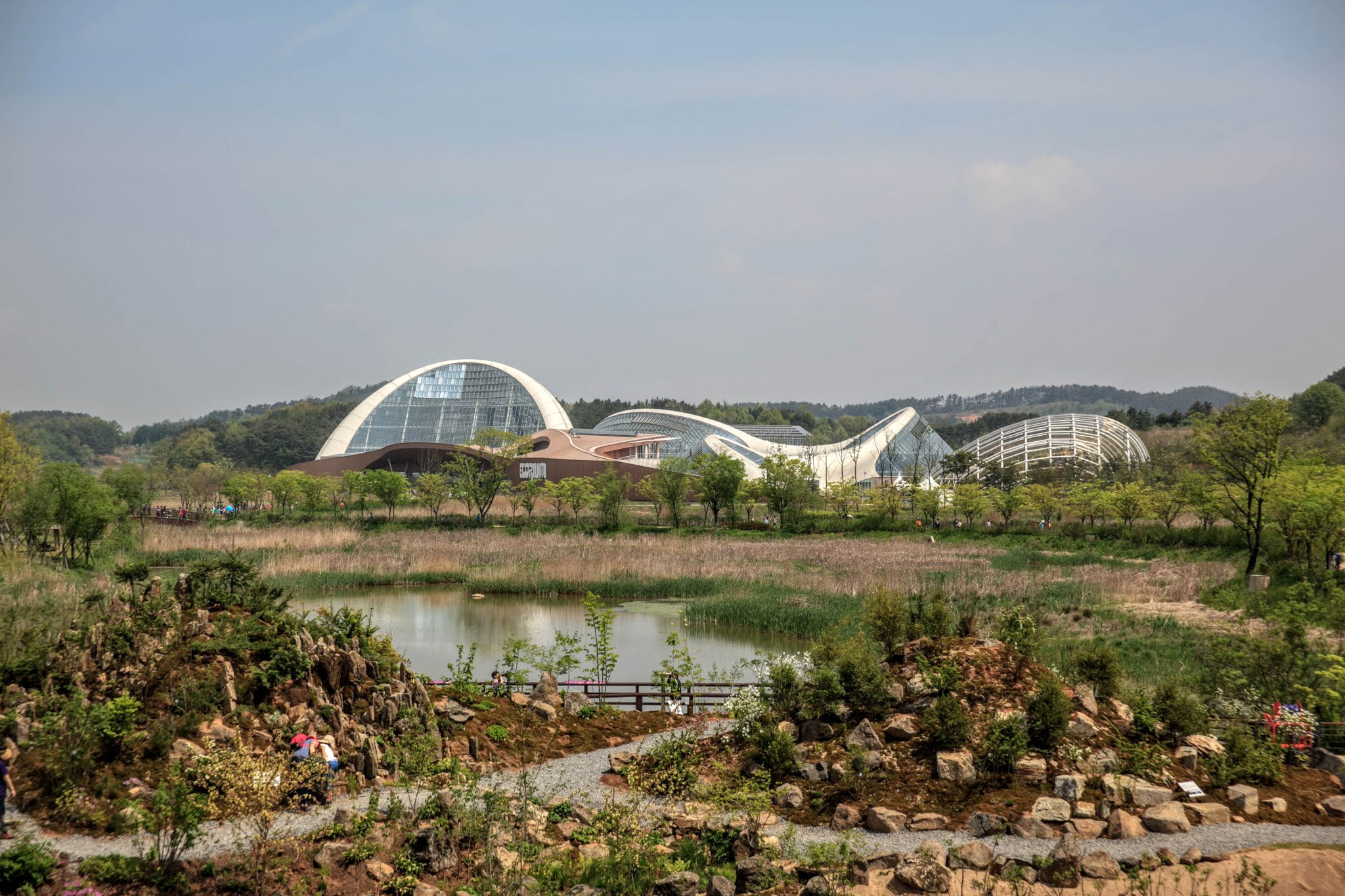 국립생태원 에코리움